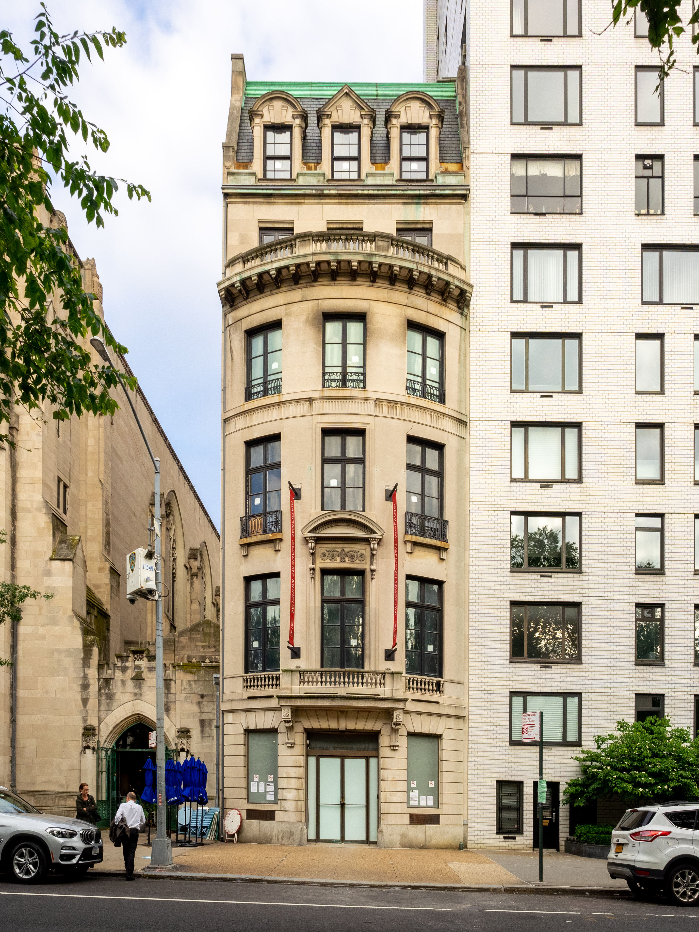 Upper East Side, NYC